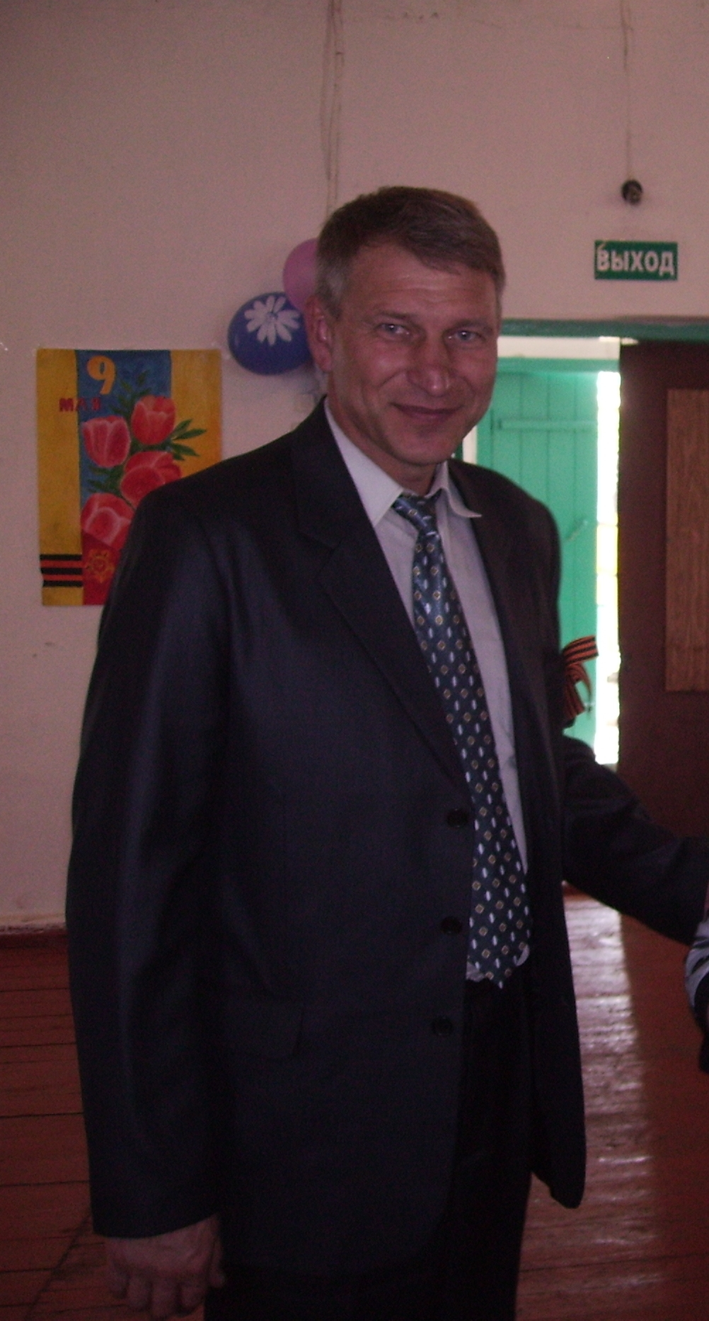 Коротков Петр Алексеевич - Глава Арчединского сельского поселения Фроловского района Волгоградской области России. Концерт, посвящённый 65-летию Победы в Великой Отечественной войне. Клуб в х. Рубёжном.